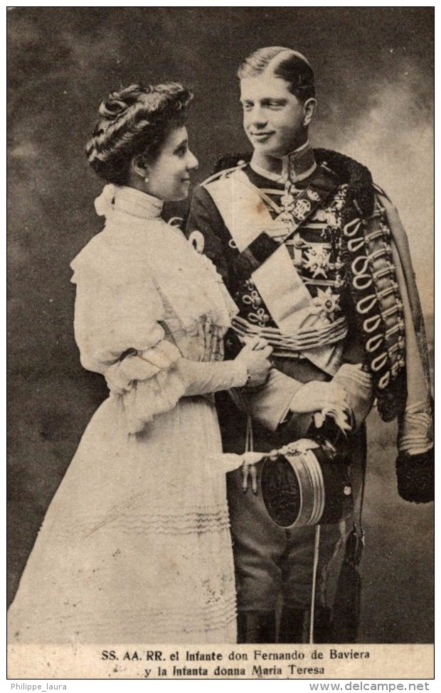 Retrato de la infanta María Teresa y príncipe Fernando de Baviera, fotografía de Christian Franzen recogida en la revista española Nuevo Mundo.